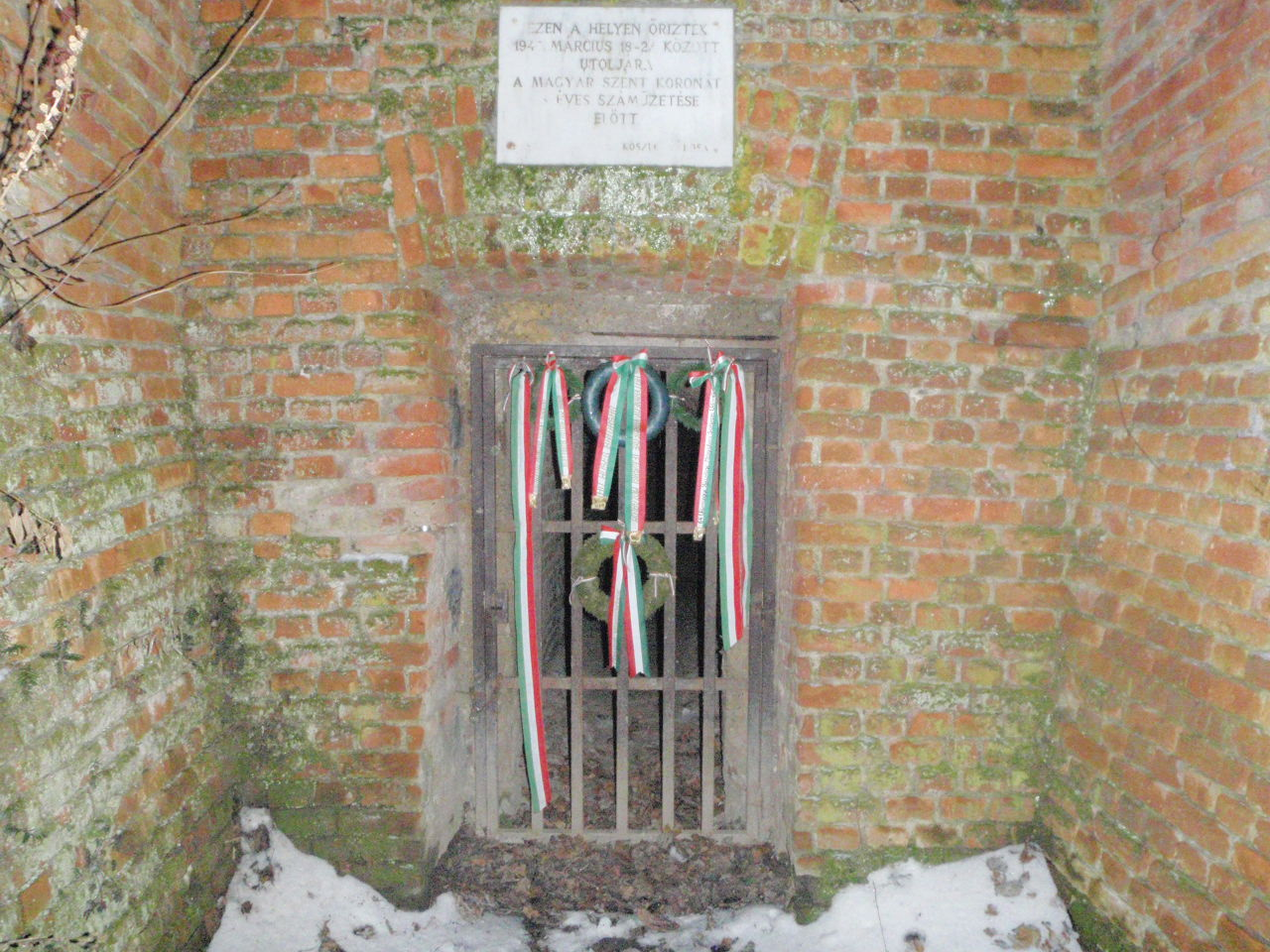 Krone von Ungarn, Denkmal